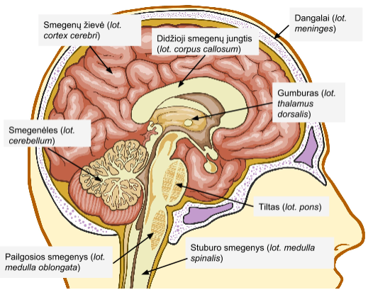 Žmogaus smegenų struktūros paveikslėlis.